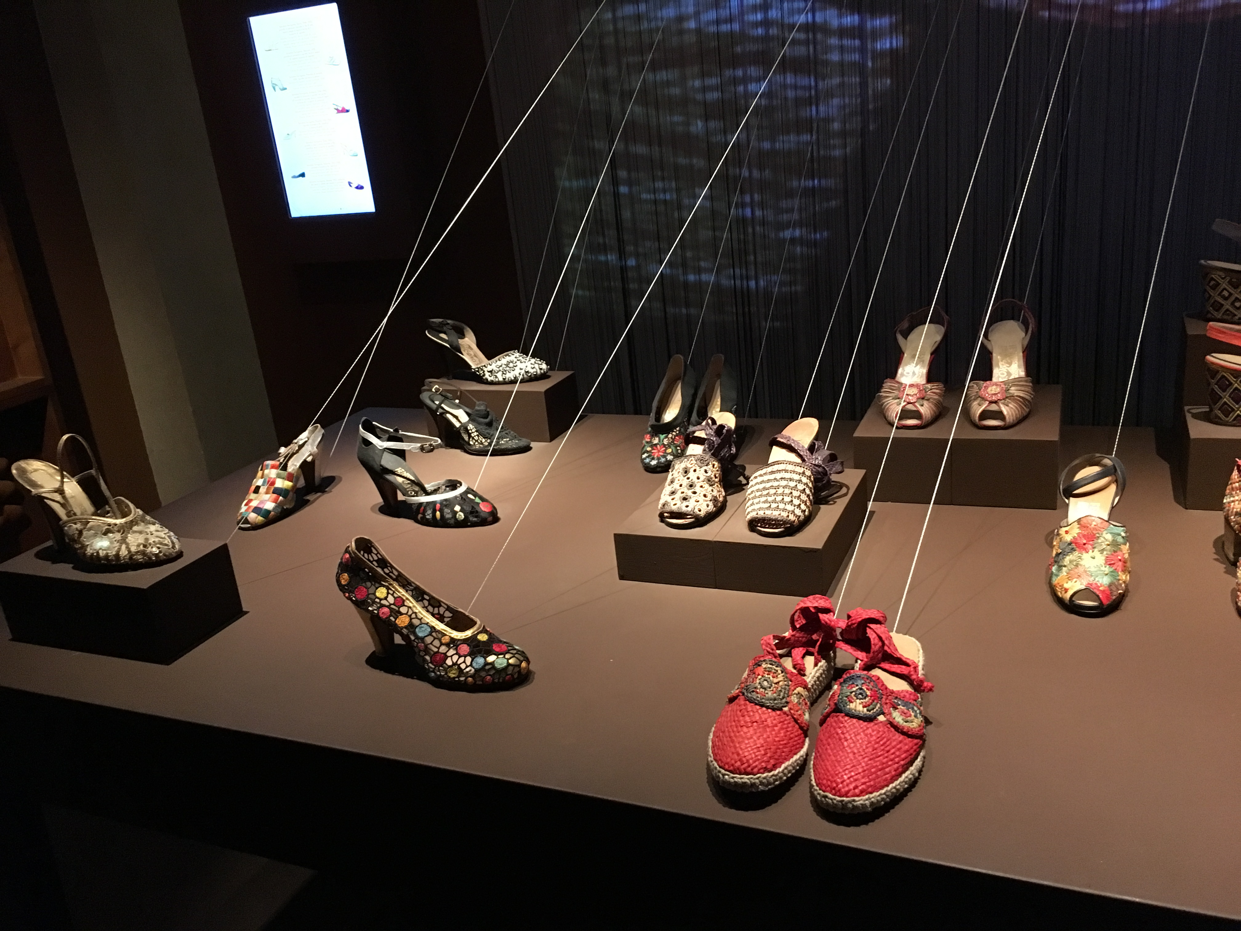 Museo Ferragamo Firenze